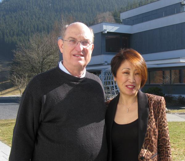 Foto di Lawrence D. Brown con Linda Zhao